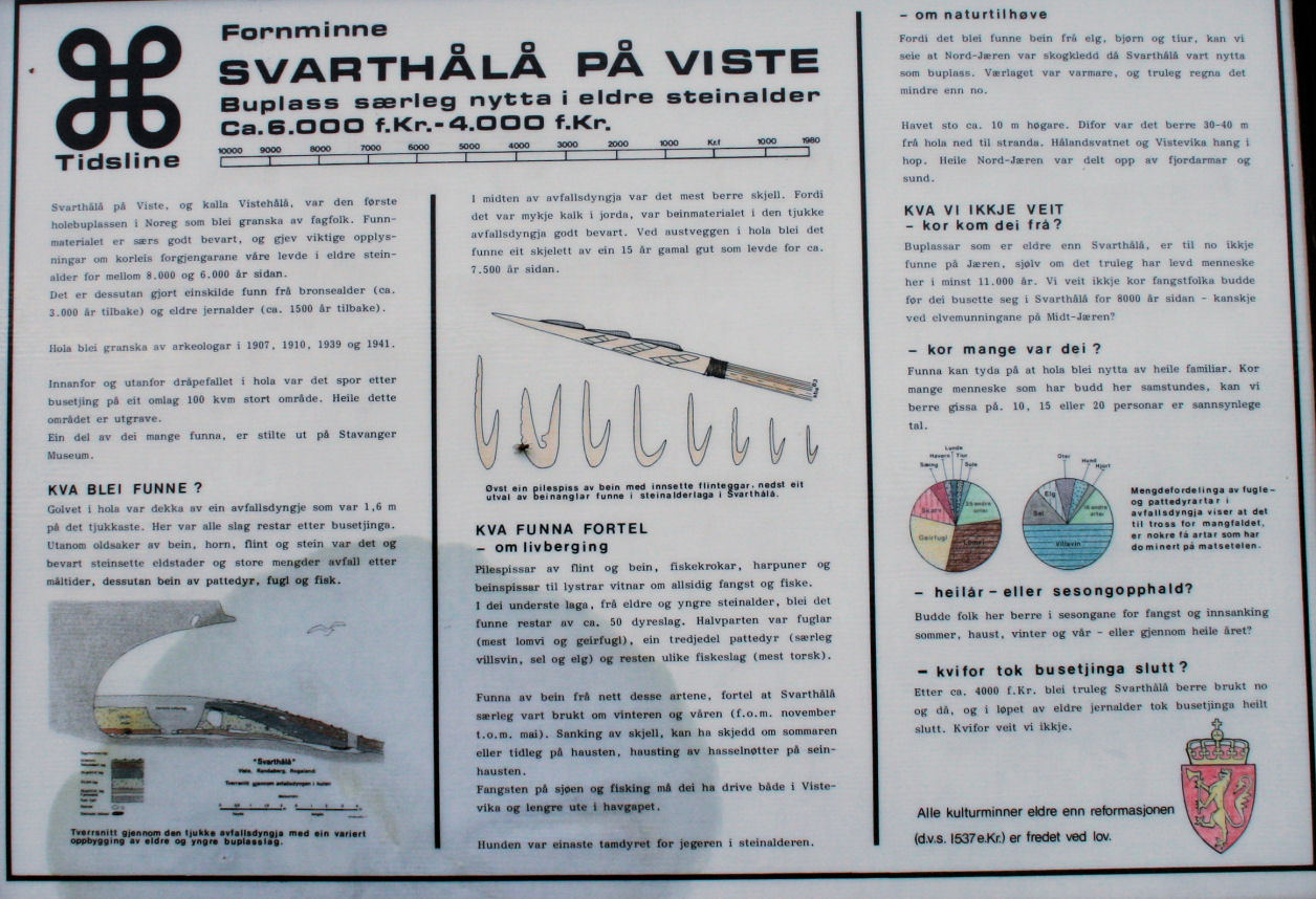 Vistehola2